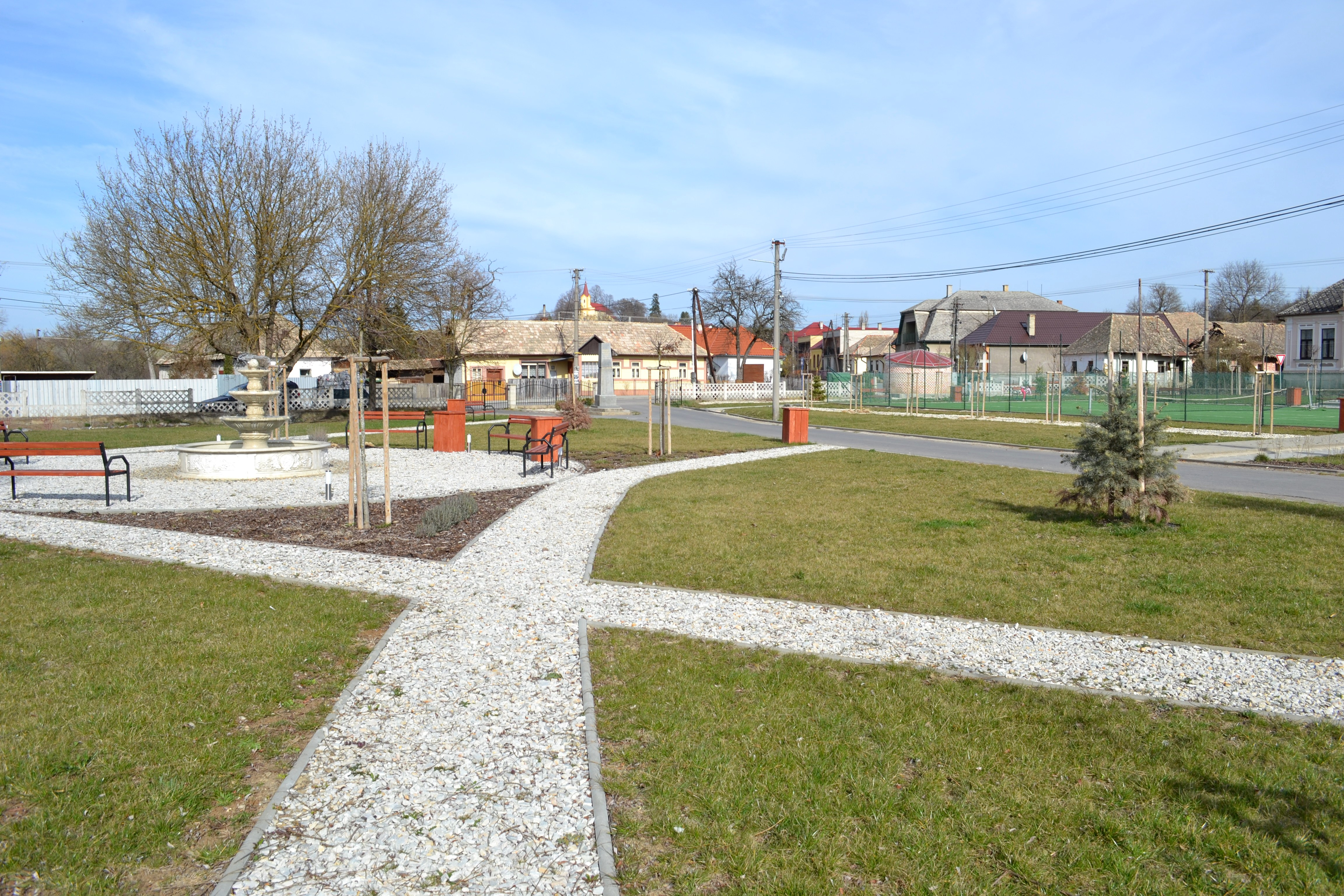 Husiná, miestny park (pri Obecnom úrade)